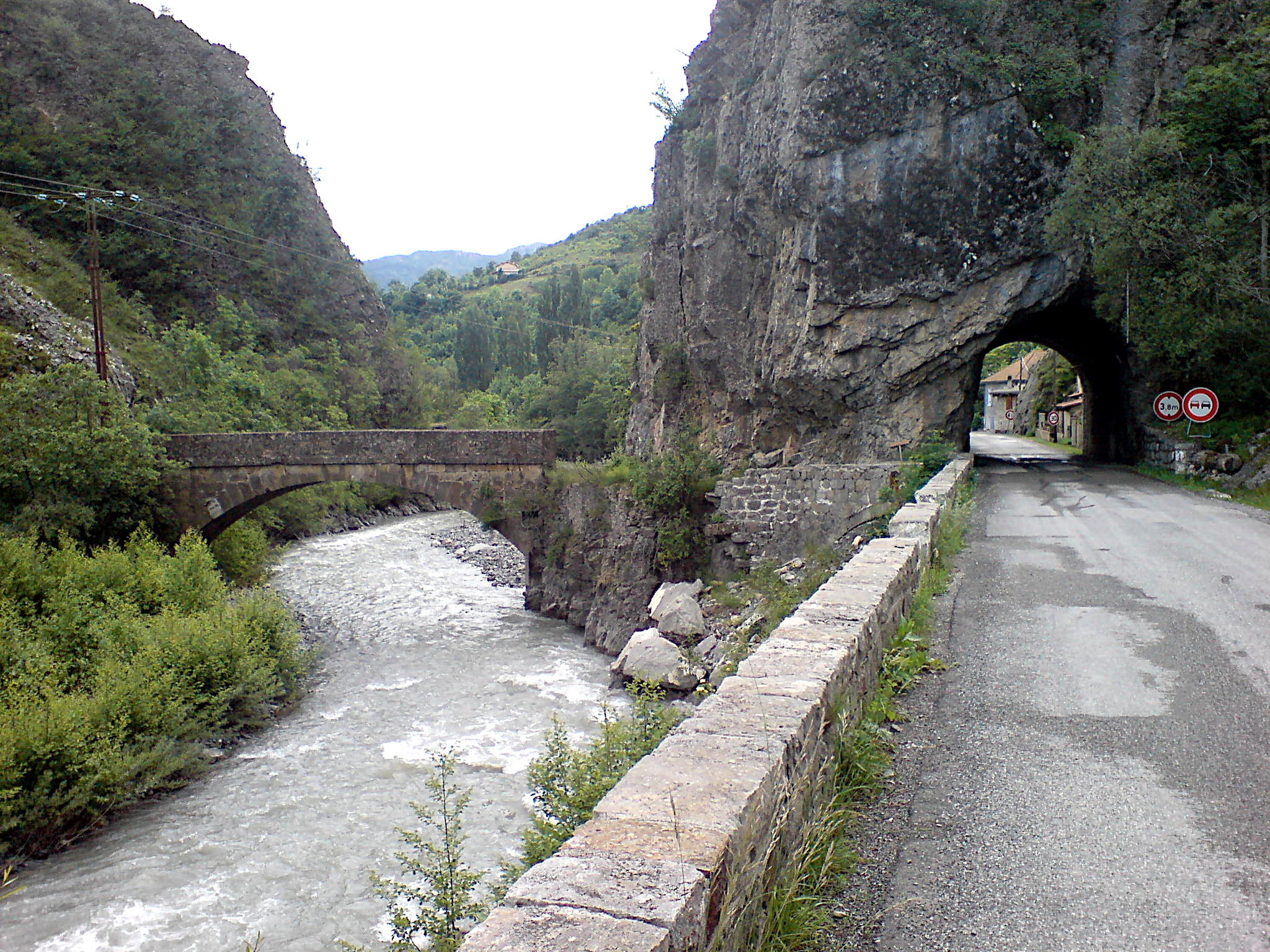 Pont muletier au dessus du Bès et tunnel de la route moderne à Barles